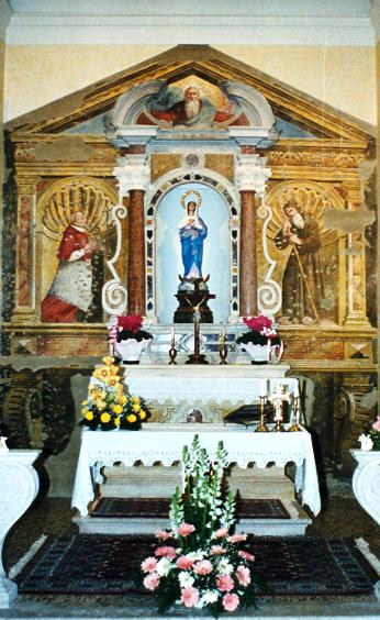 Affresco dell'altare dell'Oratorio dell'Immacolata Concezione di Cinto Caomaggiore